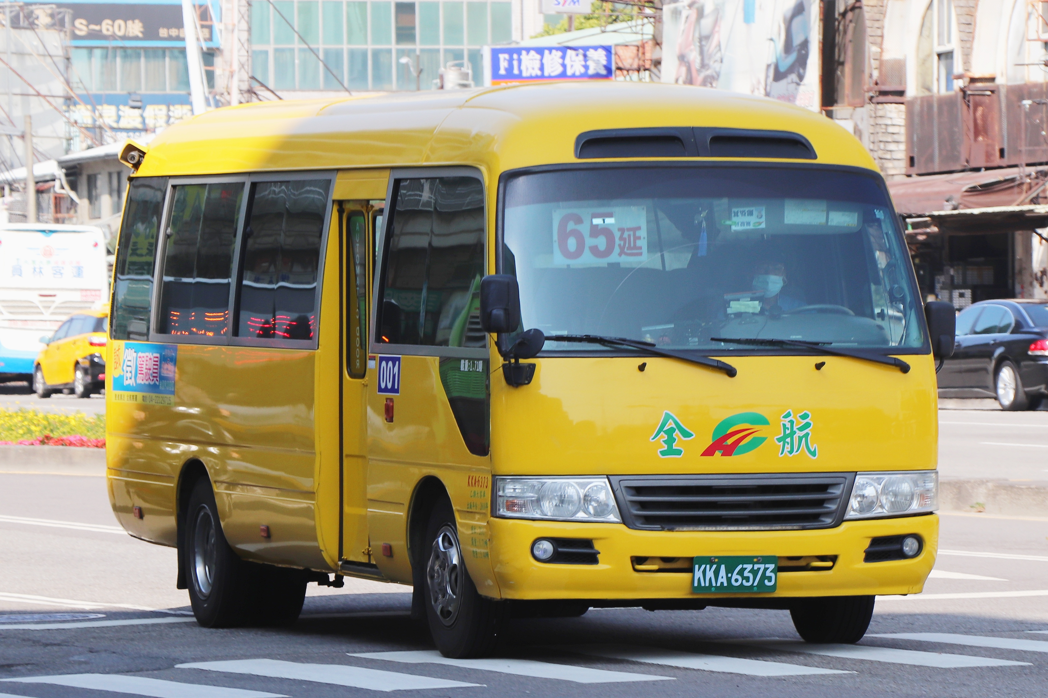 全航客運 豐田Coaster大客車 KKA-6373